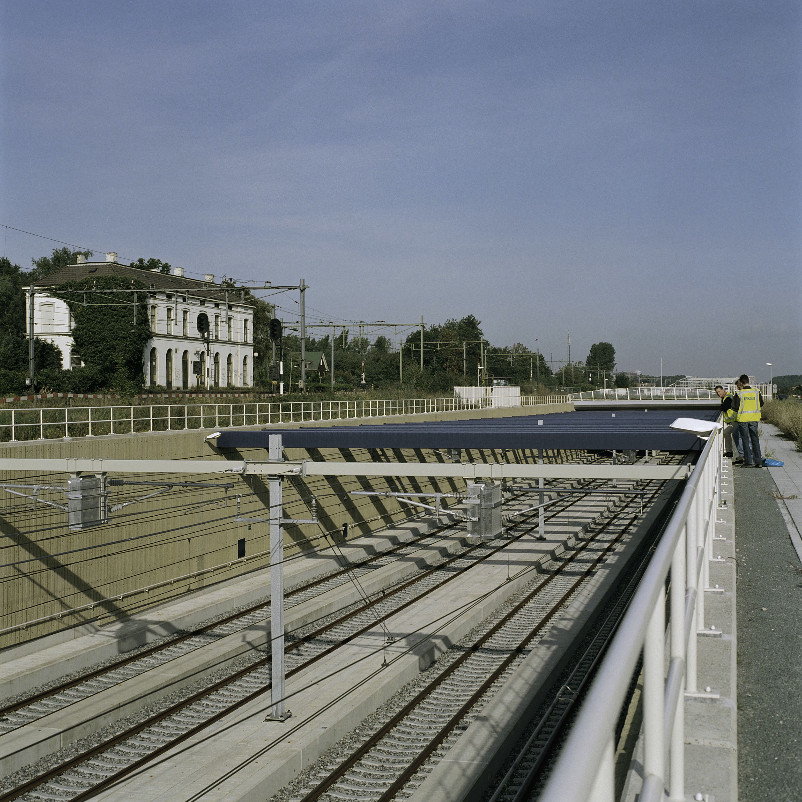 Voormalig Ns Station Abcoude - Rien Nouwen Aquaduct: Zicht in de open tunnelbak van het aquaduct, links het voormalige NS Station